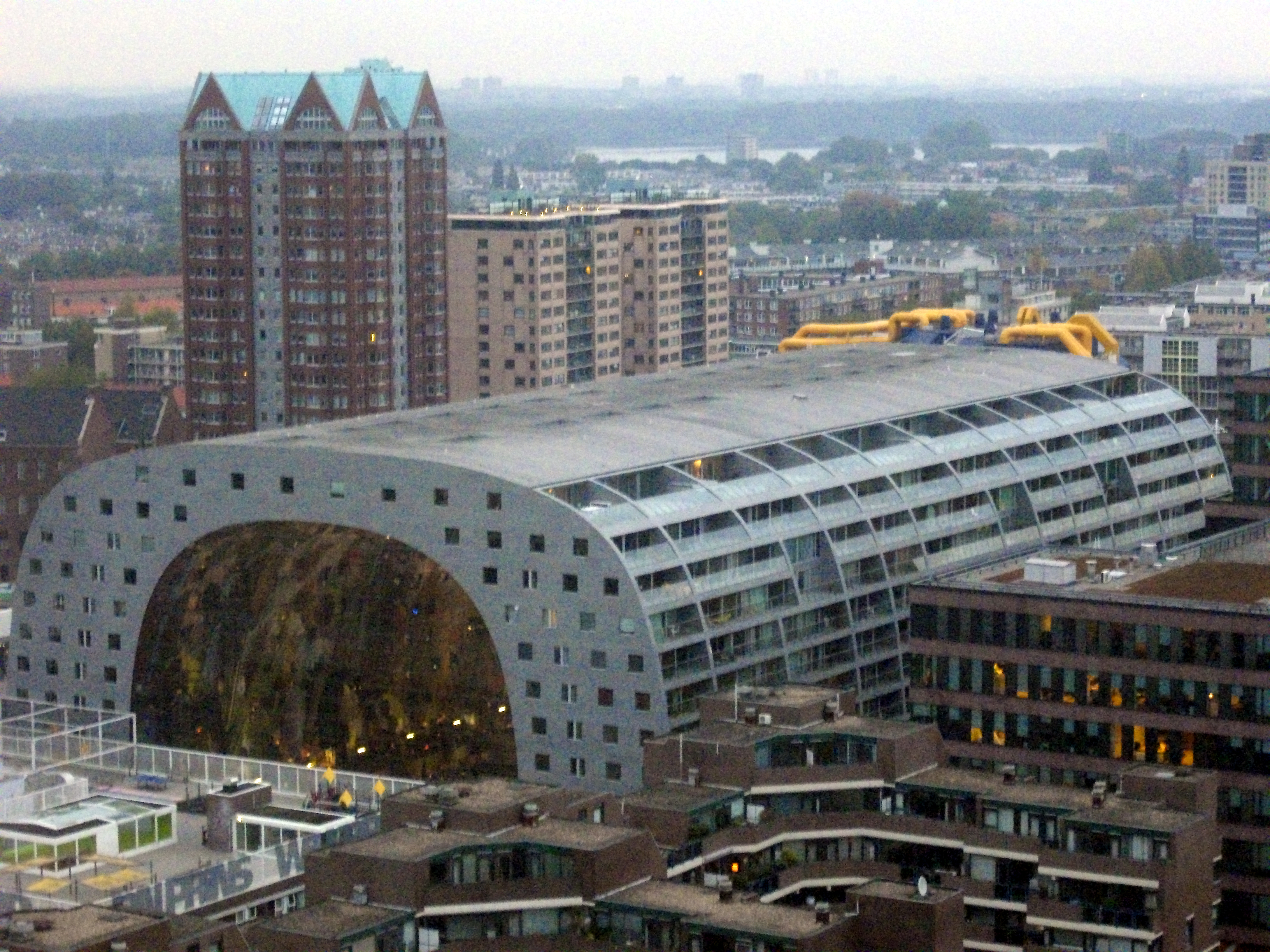 Το αρχιτεκτόνημα - εμπορικό κέντρο Markthall στο Ρότερνταμ, Ολλανδία. Οκτώβριος 2015